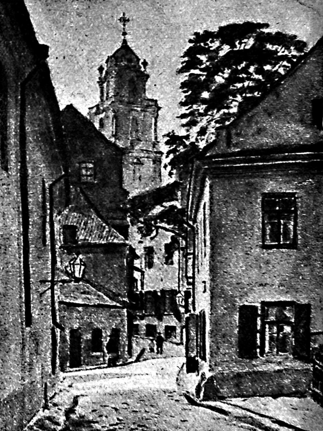 Беларуская (тарашкевіца): Вільня (Vilnia), вуліца Літарацкая (vulica Litarackaja)